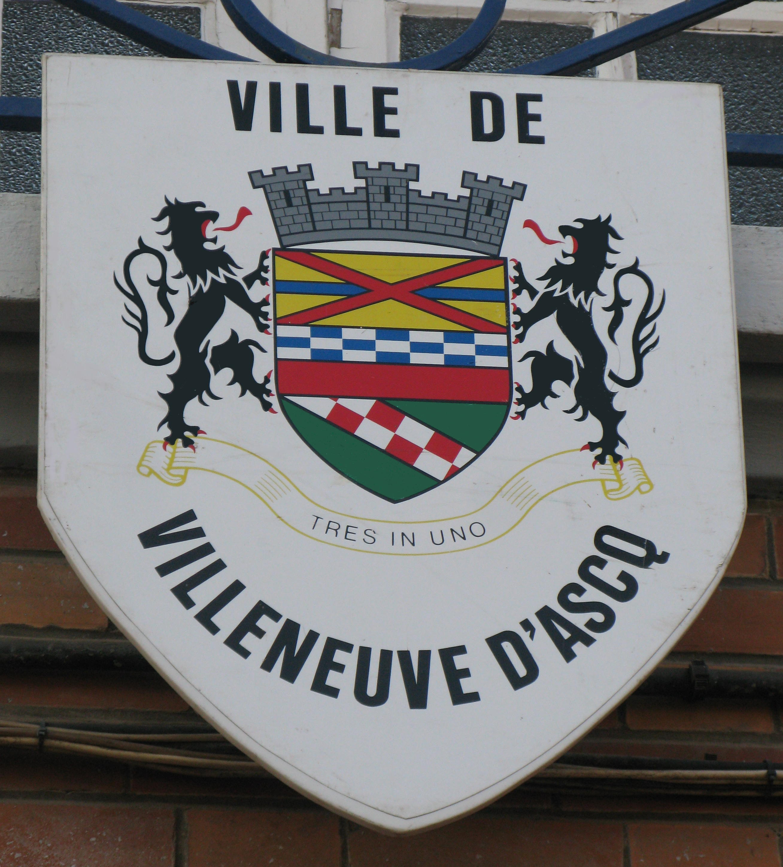 Armoiries de Villeneuve d'Ascq, sur la façade de la mairie d'Ascq, à Villeneuve d'Ascq